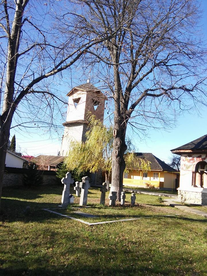 Turn clopotniță 02